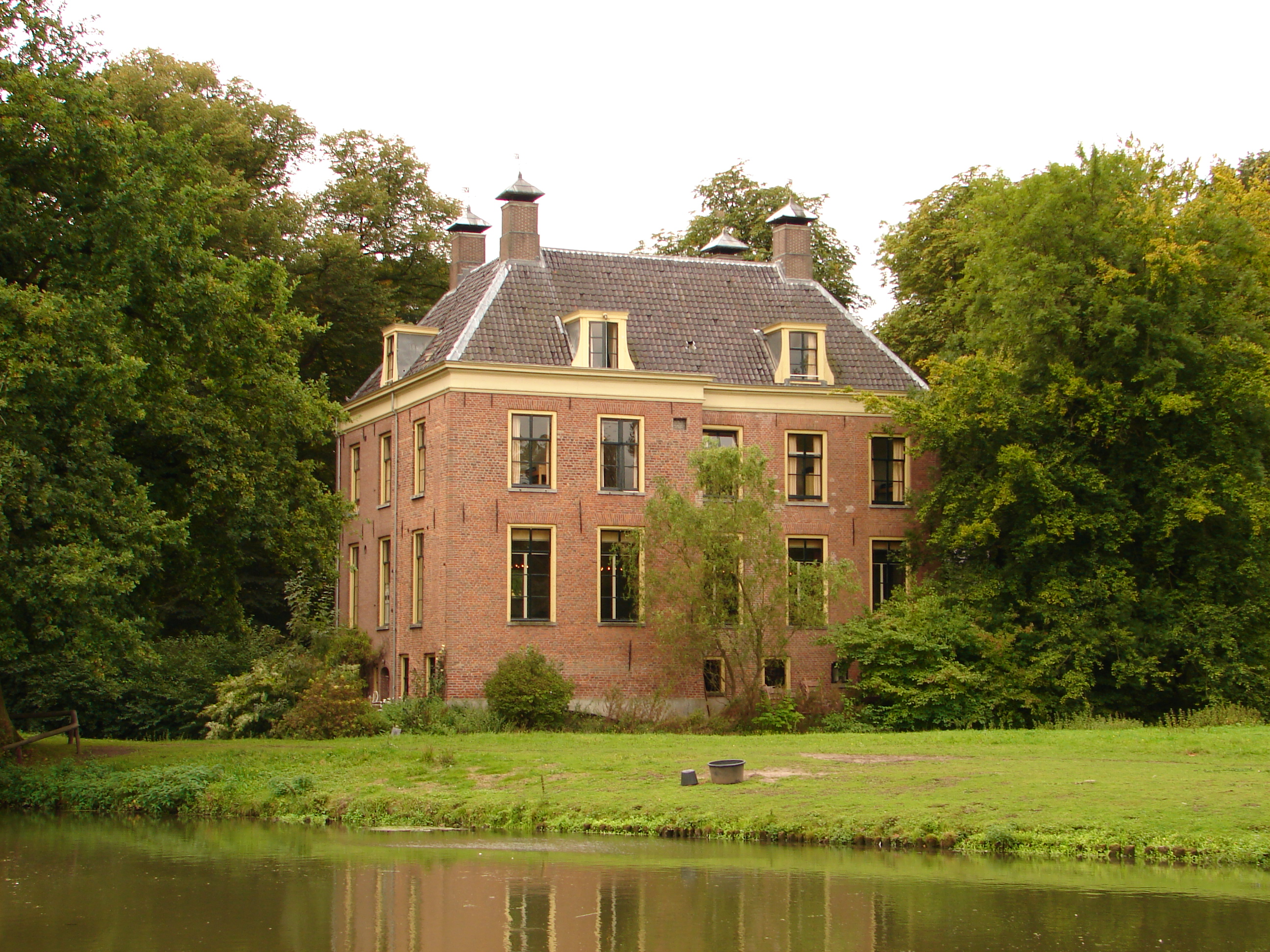 Kasteel Rijnauwen, Bunnik